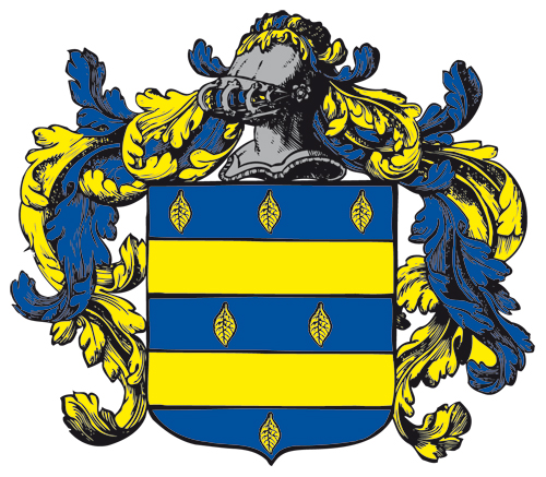 « D'azur à deux fasces d’or, accompagnées de six feuilles d’orme de même, renversées et posées, trois en chef, deux en face et l’autre en pointe ; ledit écu timbré d’un casque de profil, orné des lambrequins d’or et d’azur » qui est Pannelier d'Annel.